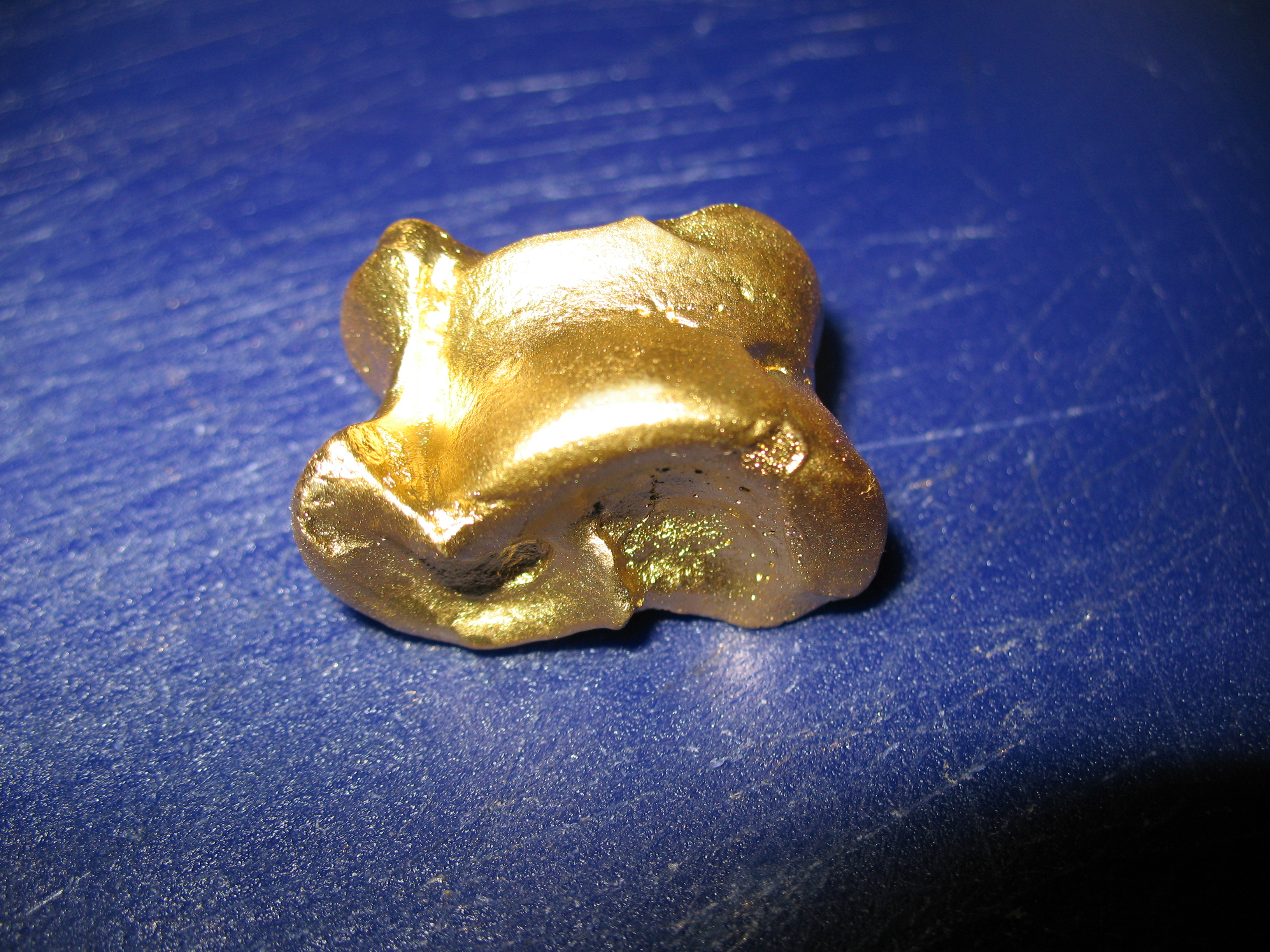 Тыва дыл: Күжүгет Алиниң тыва кажыктыр нептеридип турар ажылының бирээ чуруу